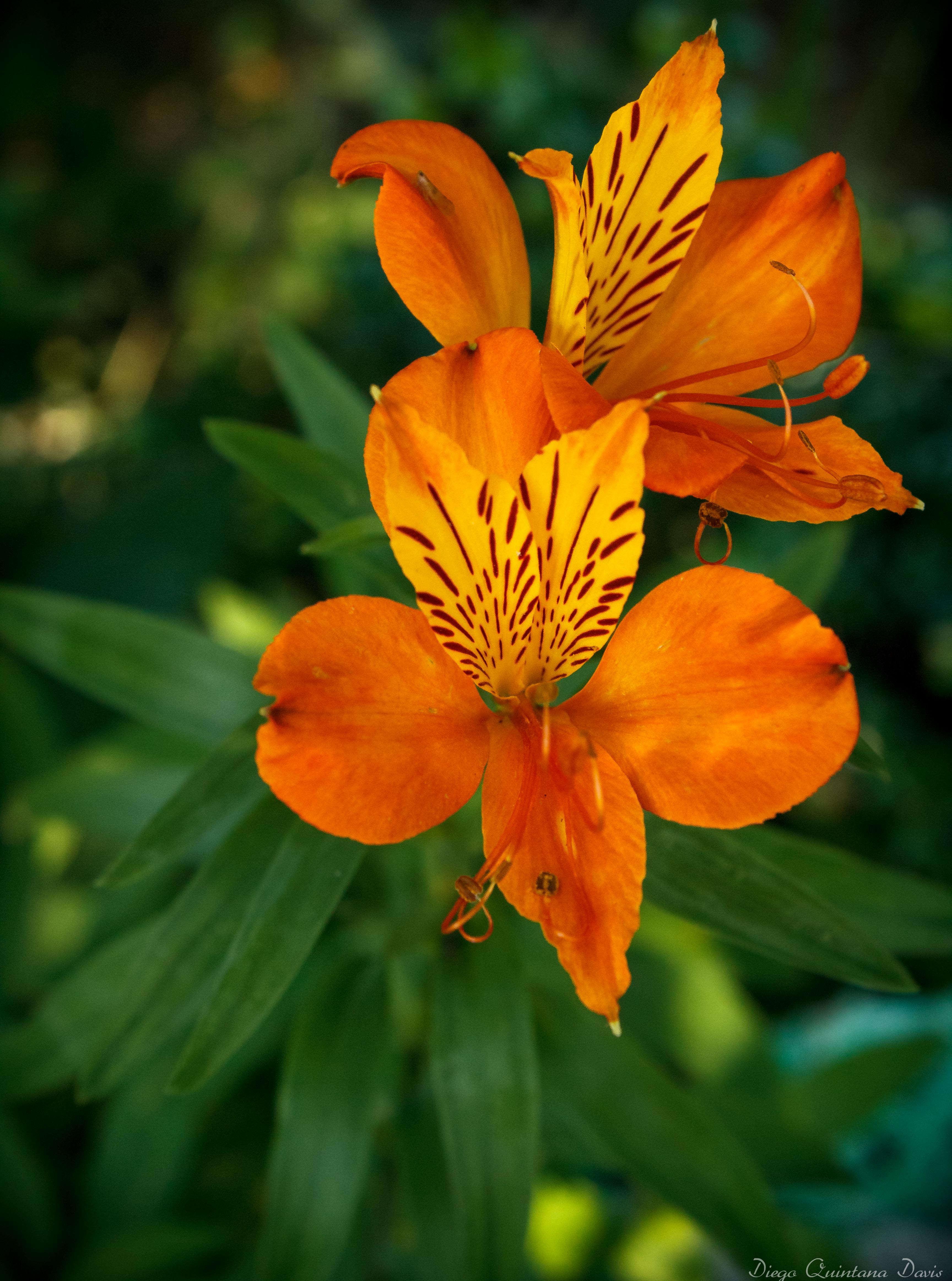 Alstroemeria ligtu, Isla Helvecia